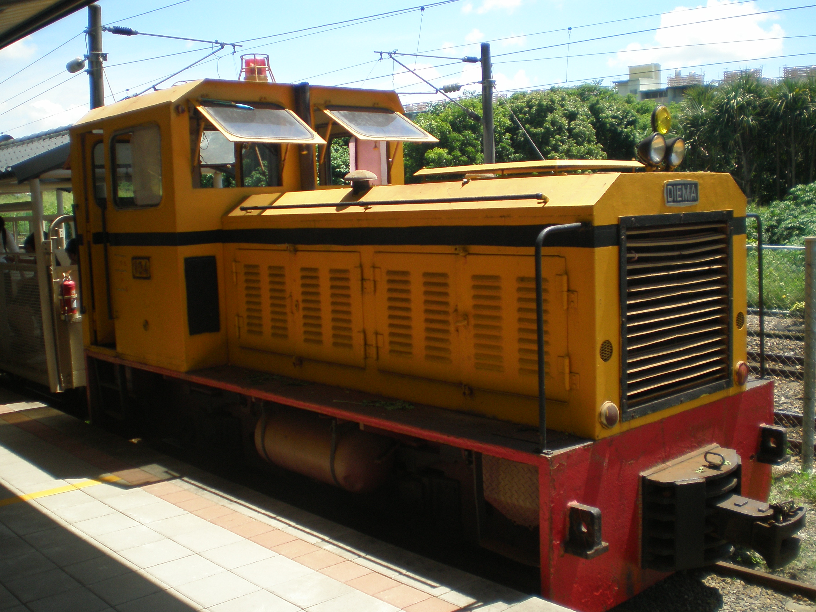 在高雄糖廠牽引觀光列車的德馬B型機車